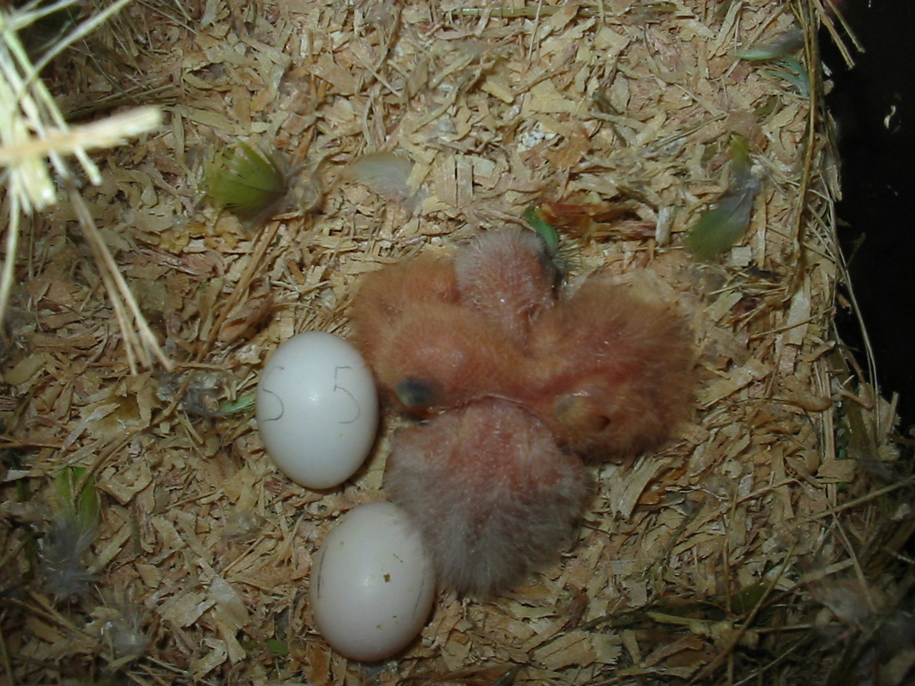 Oisillons d'A. roseicollis dont un Aqua (duvet blanc)